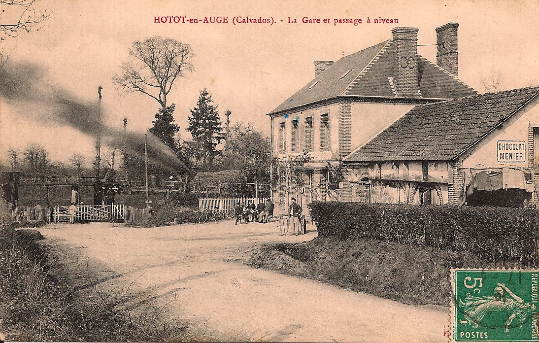 La gare